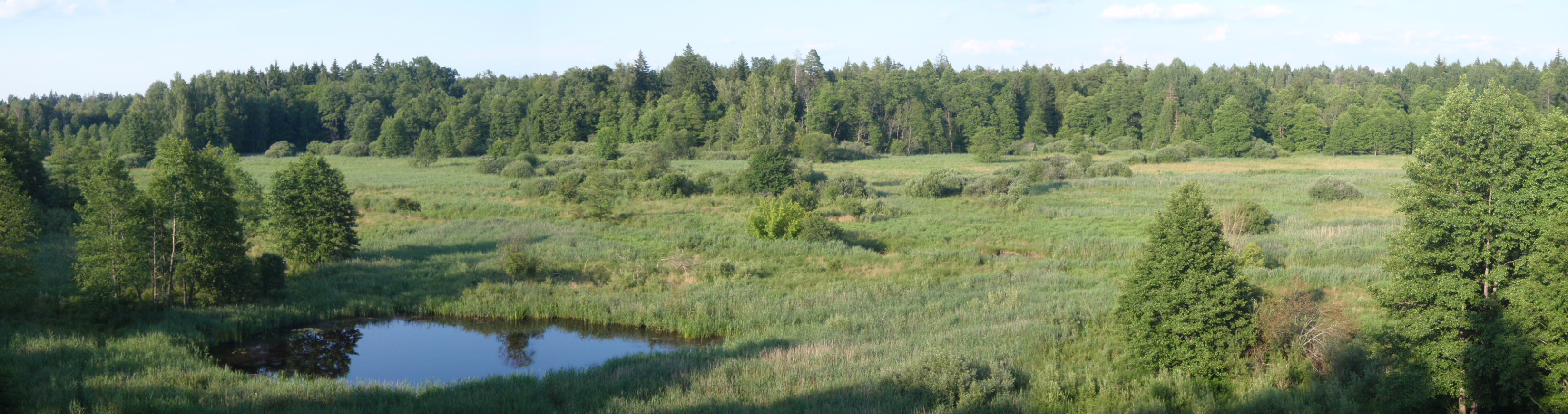 widok z wieży widokowej k/uroczyska Kosy Most na dolinę Narewki